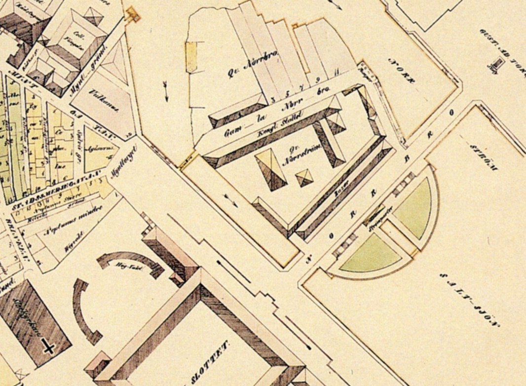 Del av "Karta öfer Stockholm inom Broarne, Riddarholmen sammandragen och lithograferad af C.J. Küsel 1848"